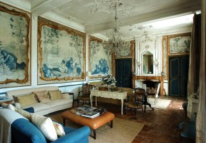 Anciens appartement du prieur de l'Abbaye Thomas Lavaur, les peintures de ce salon sont attribuées à Boucher. Aujourd'hui ces salons sont réservés à la clientèle des chambres d'hotes de l'Abbaye de Camon (09)